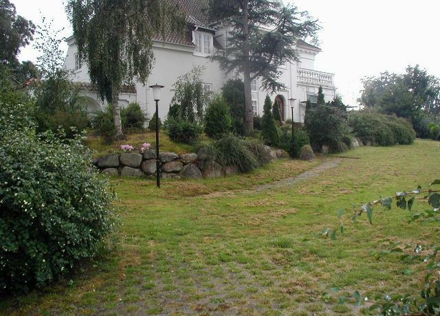 Forhave i Nørresundby Template:Front garden at Nørresundby, Denmark